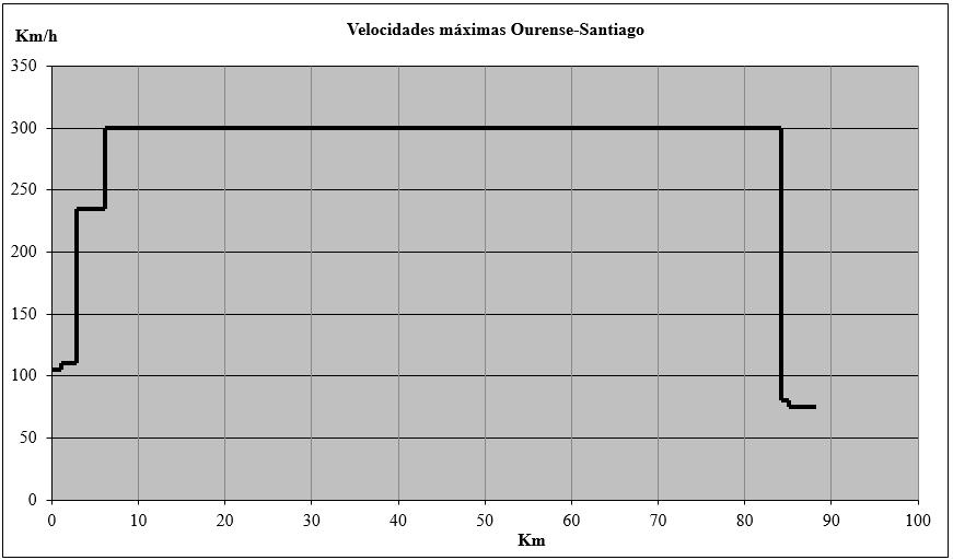 Velocidades máximas Ourense-Santiago